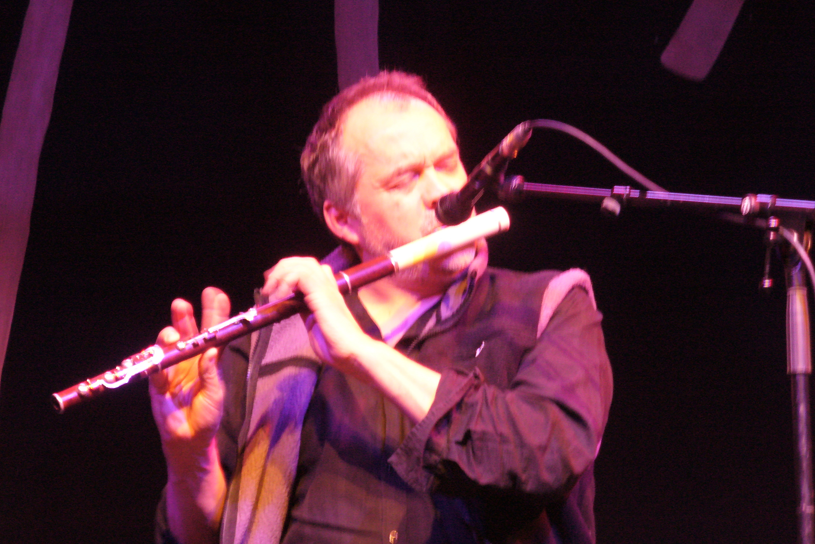 Le flûtiste Jean-Michel Veillon avec le groupe Pennoù Skoulm au Celtic Connections de Glasgow en 2010.